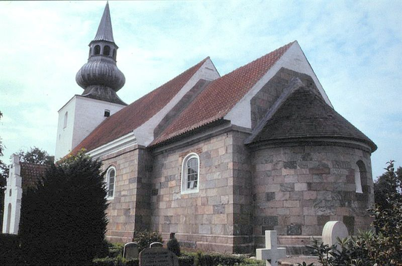 Vindum, Viborg Kommune, set fra sydøst